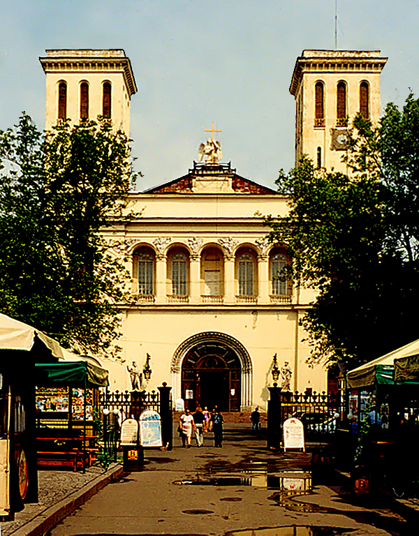 Кирха апостола Петра